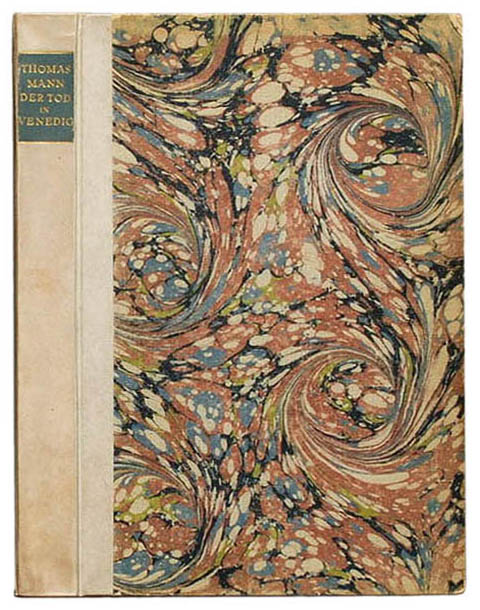 Thomas Mann: Der Tod in Venedig. Novelle. [1] Berlin: S. Fischer 1913. Original-Verlagseinband in Halbpergement. Potempa E26.3 [2]